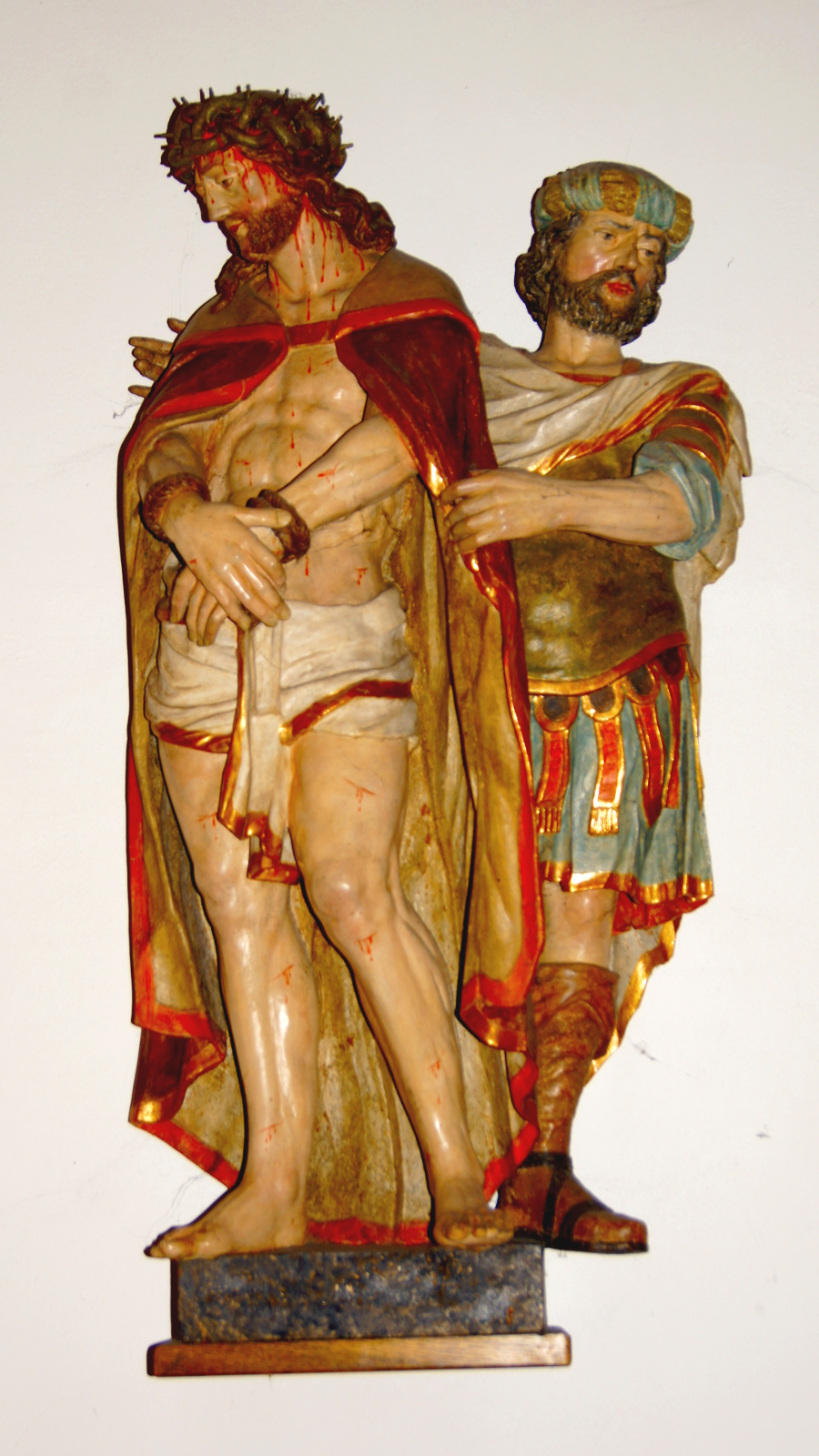 Ecce-homo-Darstellung (frühes 17. Jahrhundert) in der Klosterkirche St. Marien Burlo, Stadt Borken, NRW.This is a photograph of an architectural monument. A1 - A 26